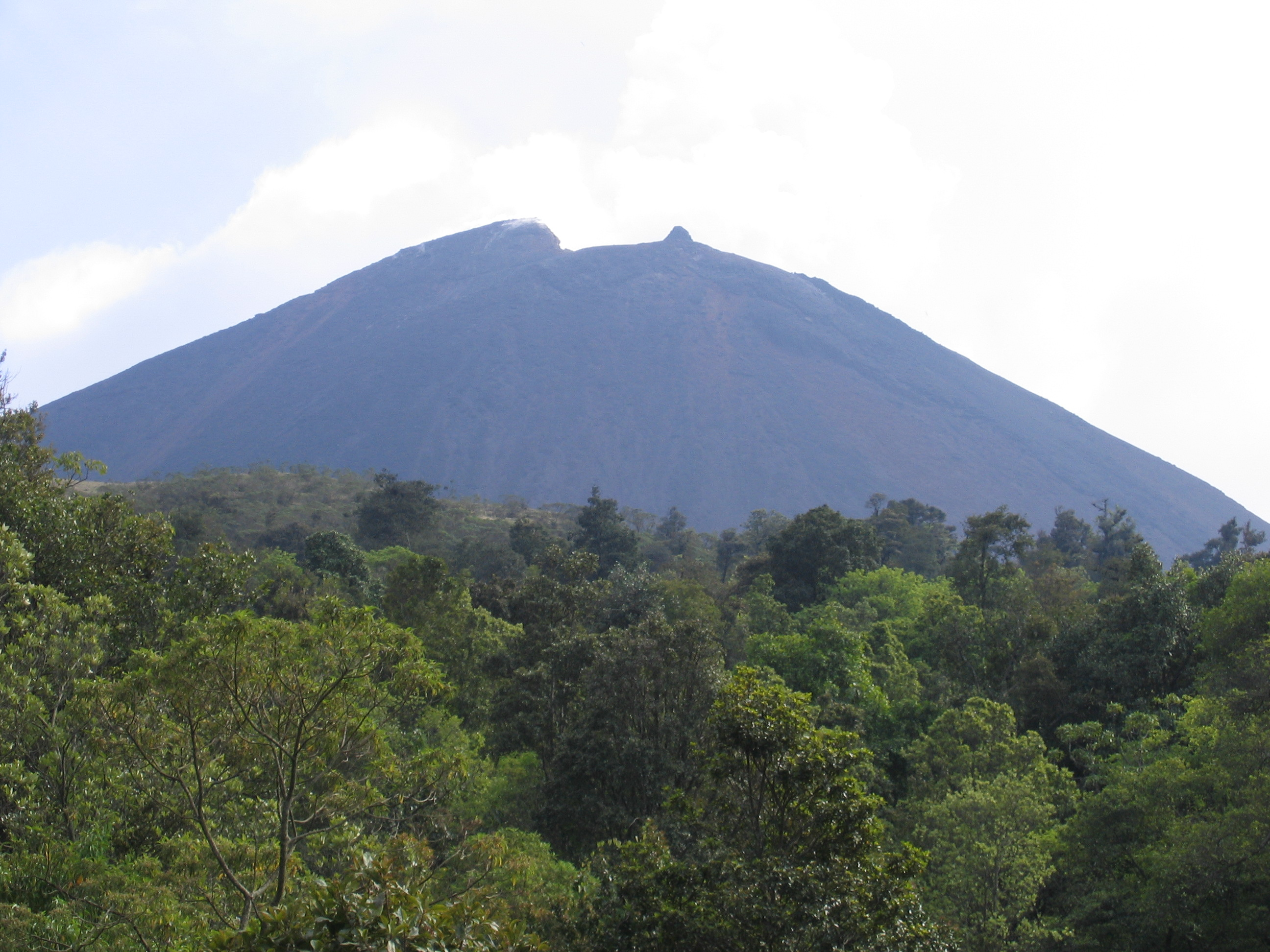 Volcan Pacaya in Guatamala